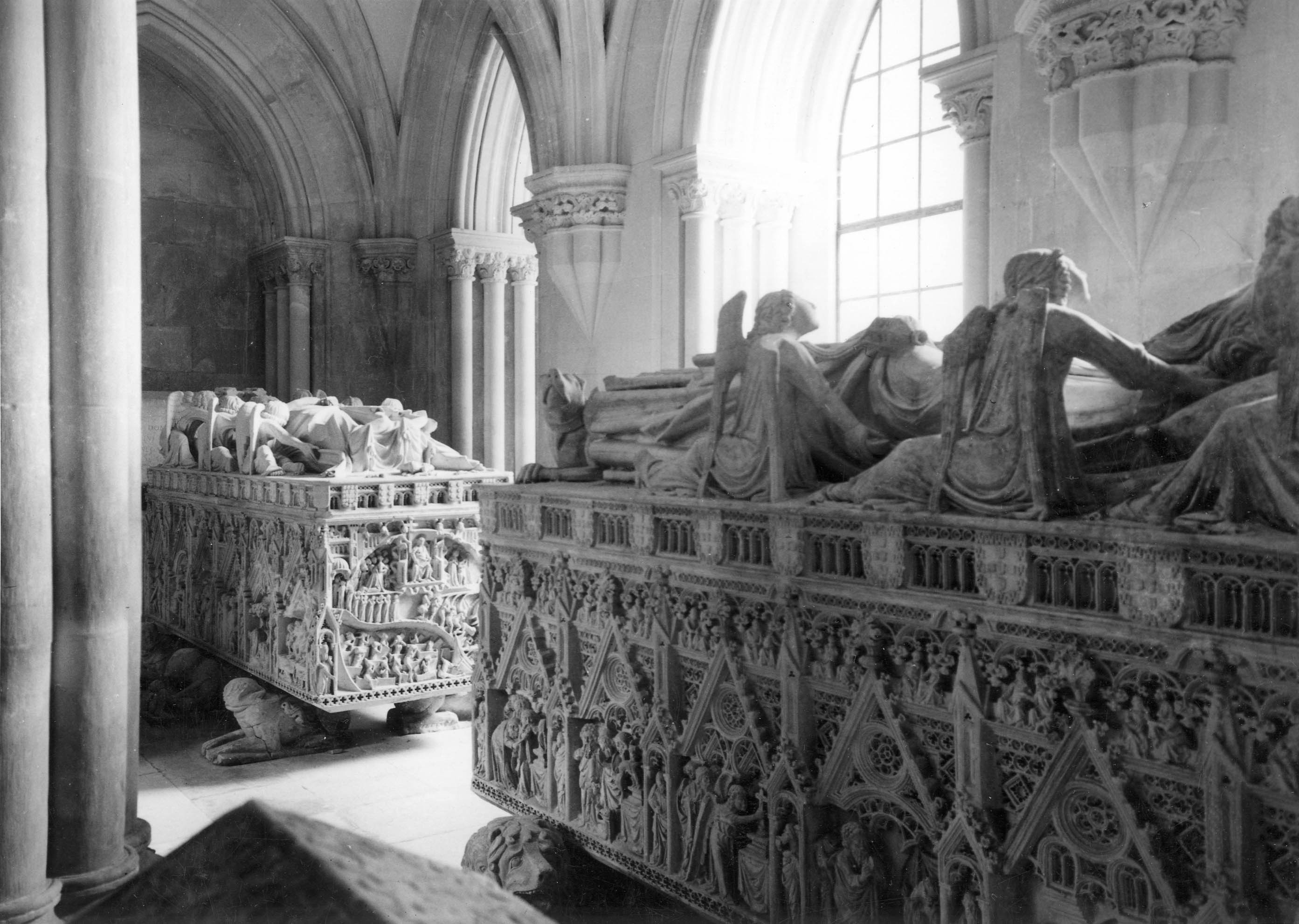 Túmulos de Dom Pedro e Dona Inês. Fotógrafo: Mário Novais, 1899-1967. Orientador científico: Mário Tavares Chicó, 1905-1966. Data aproximada da produção da fotografia original: 1954. [CFT015.137.ic]